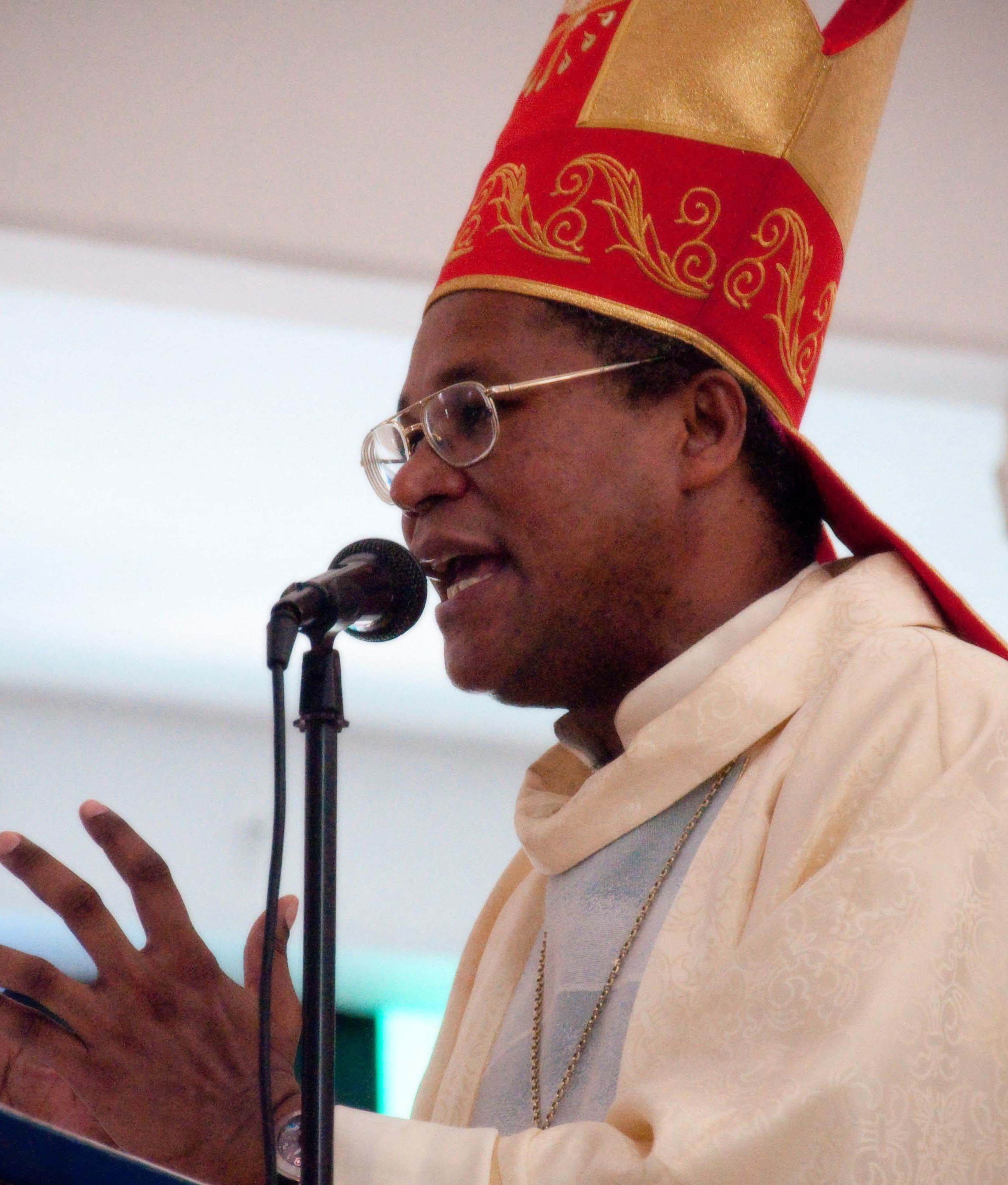 Pierre-André Dumas, évêque du diocèse d'Anse-à-Veau et Miragoâne